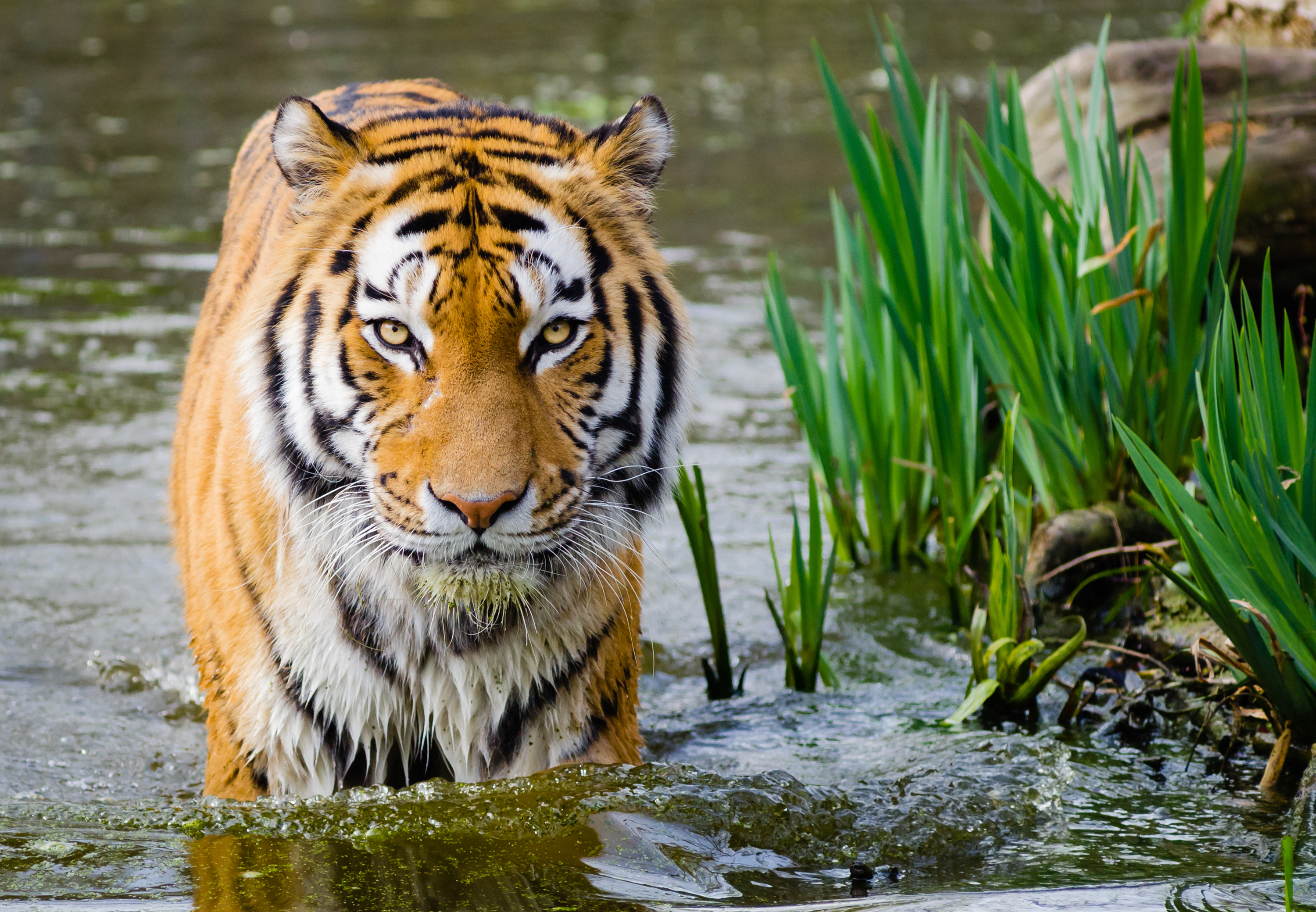 Tiger